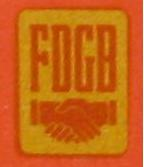 Logo of the Free German Trade Union (Freier Deutscher Gewerkschaftsbund, FDGB), an East German (GDR) trade union